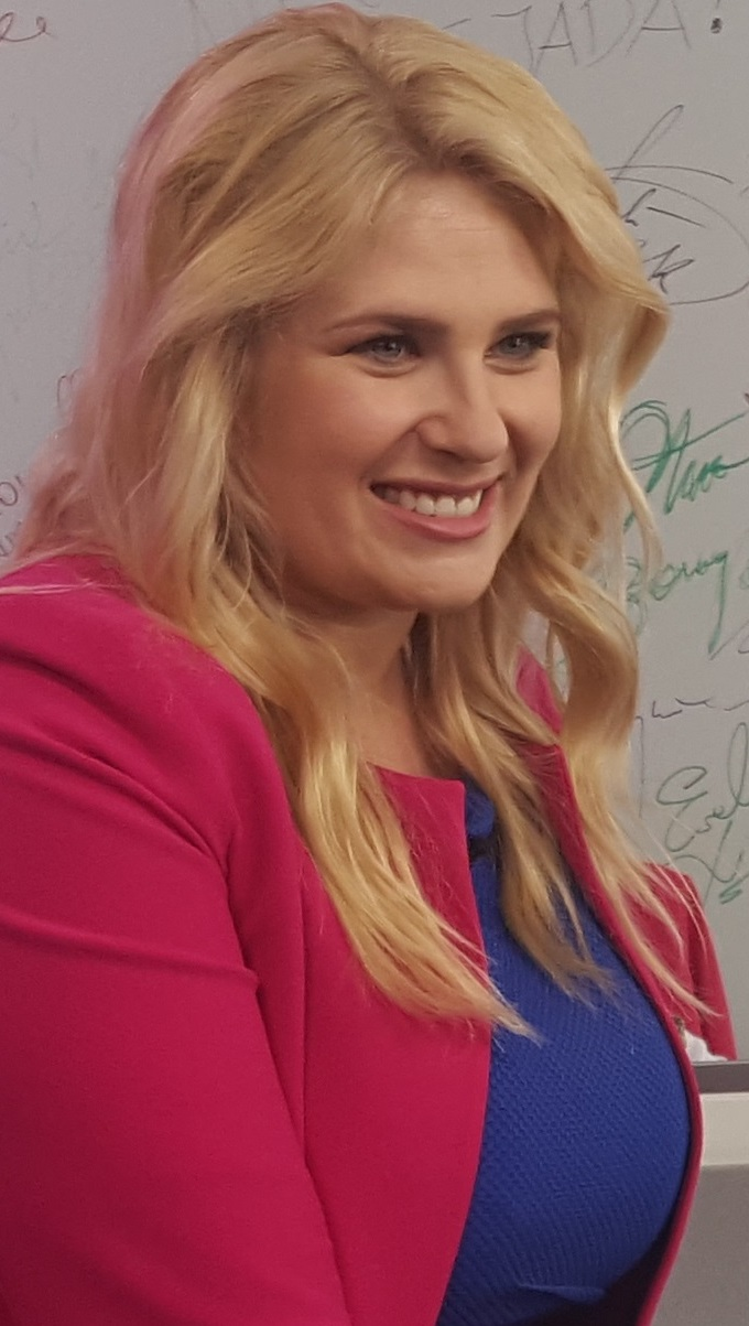 Polska aktorka Elżbieta Romanowska na nagraniu programu "Gwiazdy Cejrowskiego" w maju 2017 roku.